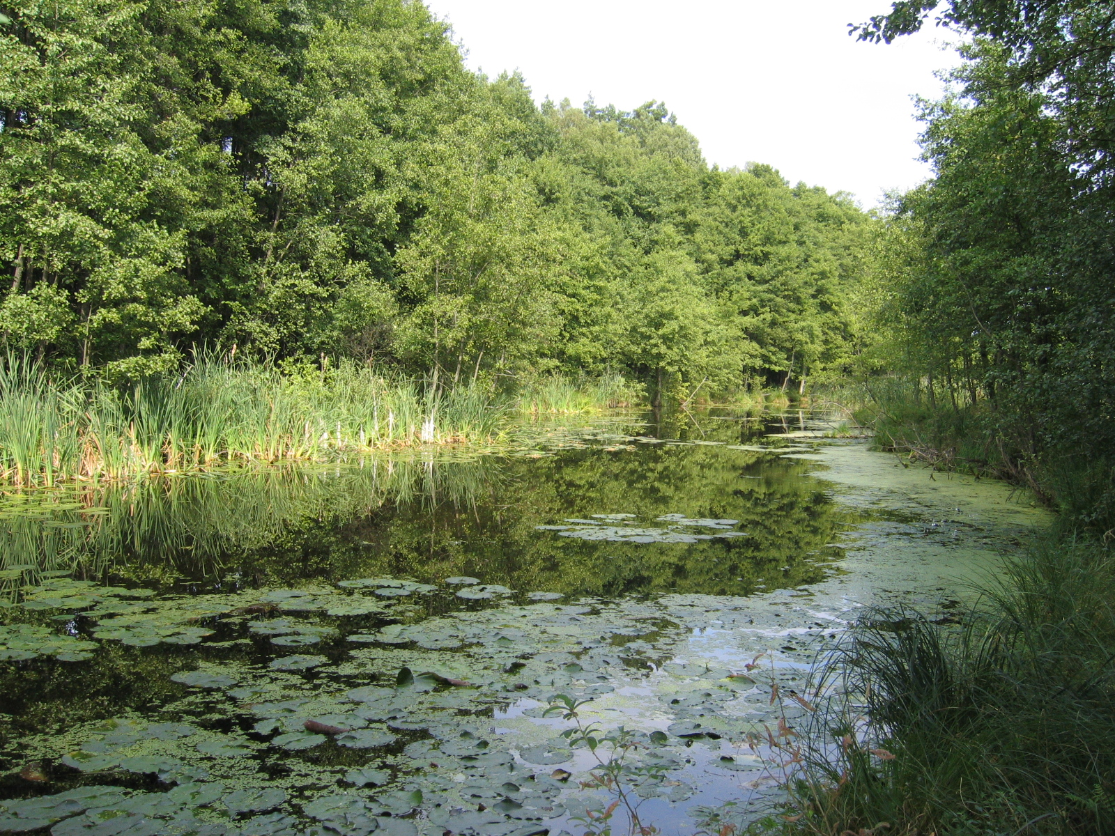 Bukówka